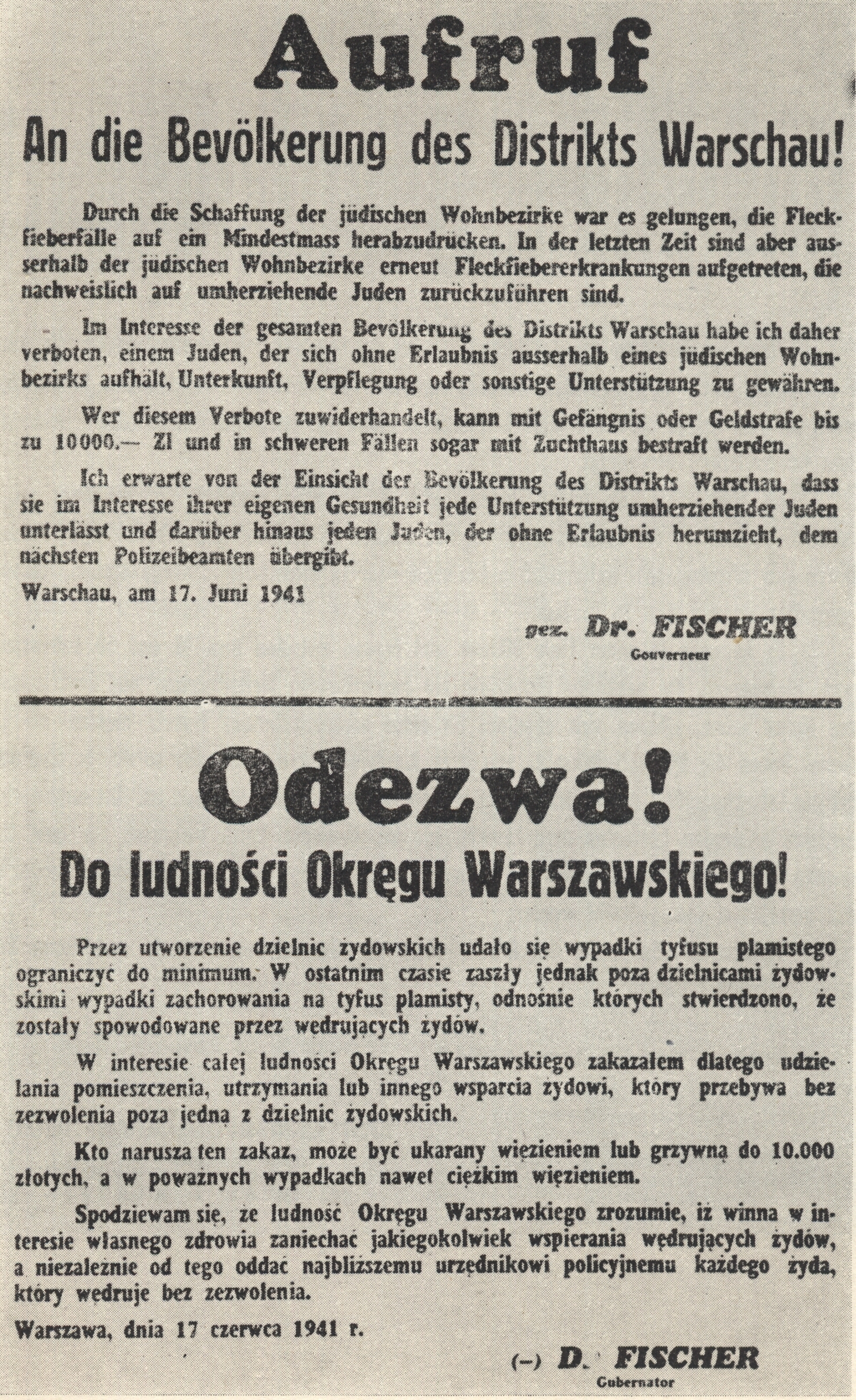 Aufruf an die Bevolkerung des Distrikts Warschau!